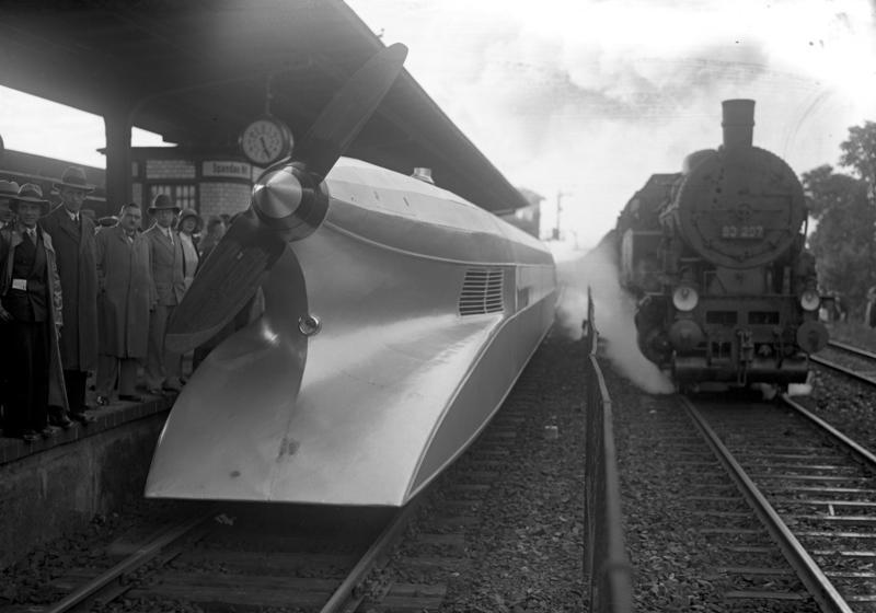 Der Schienenzeppelin in Berlin! Technik von gestern und heute. Ein Schnellzug auf dem Wege nach Hamburg passiert auf dem Spandauer Hauptbahnhof den soeben eingetroffenen Schienenzeppelin.